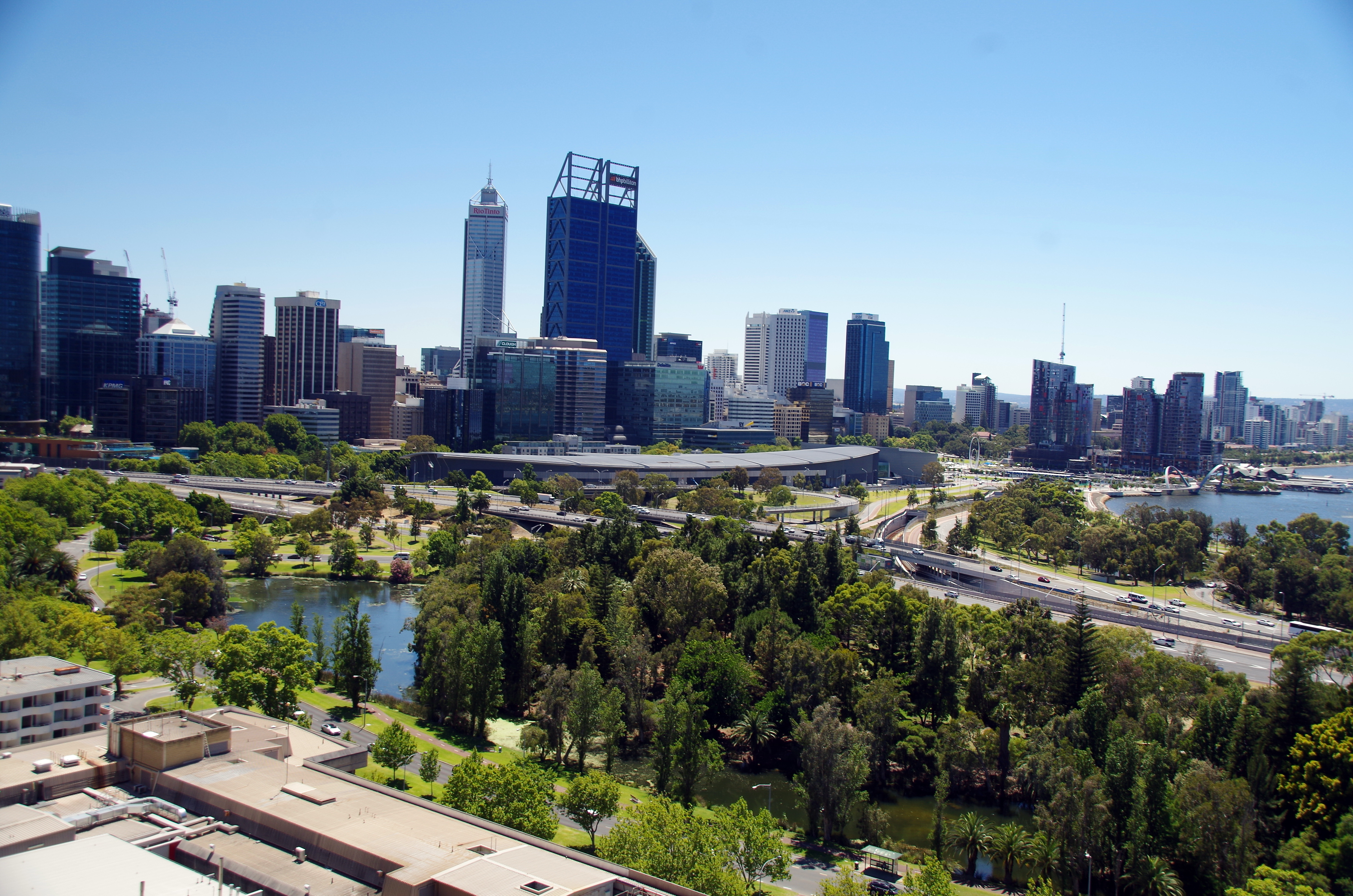 Perth Blick vom bot. Garten